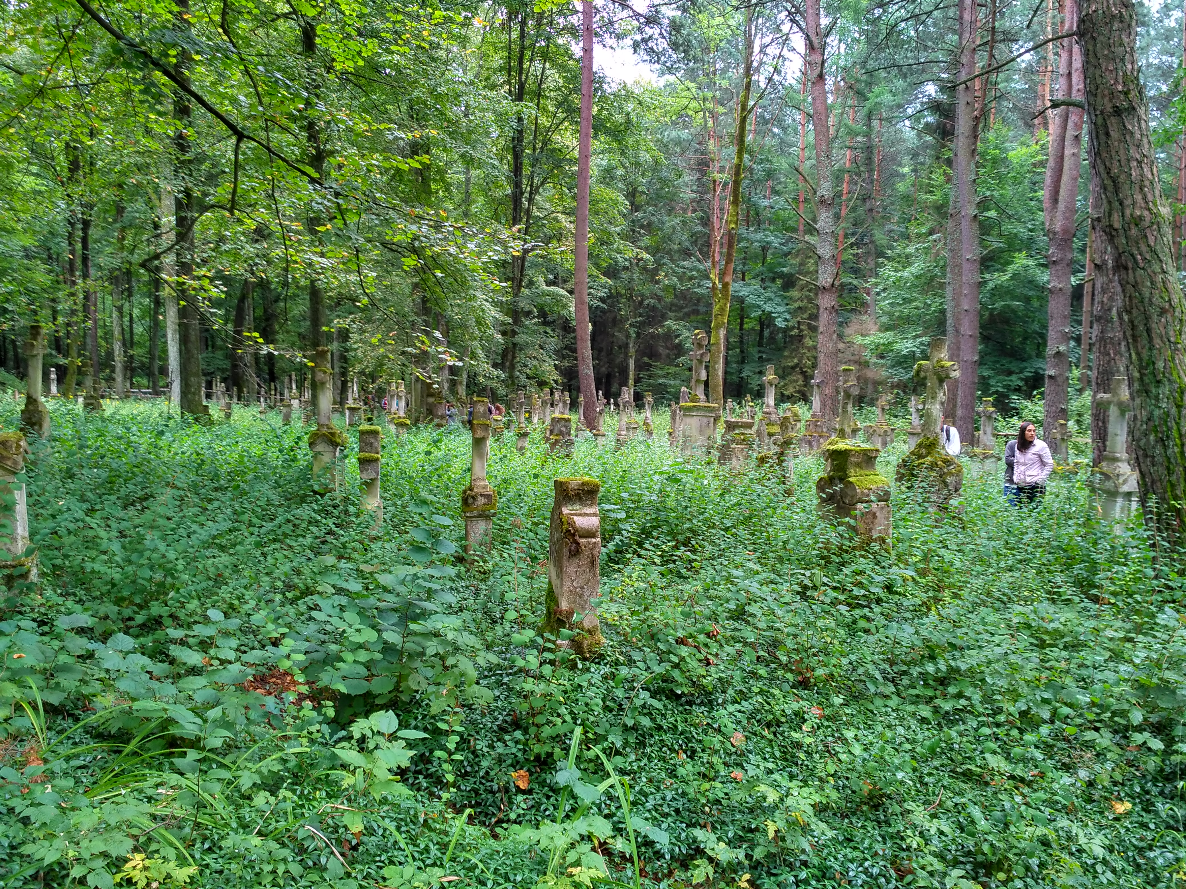 Загальний вигляд цвинтаря в Брусні Старому в серпня 2016 року.